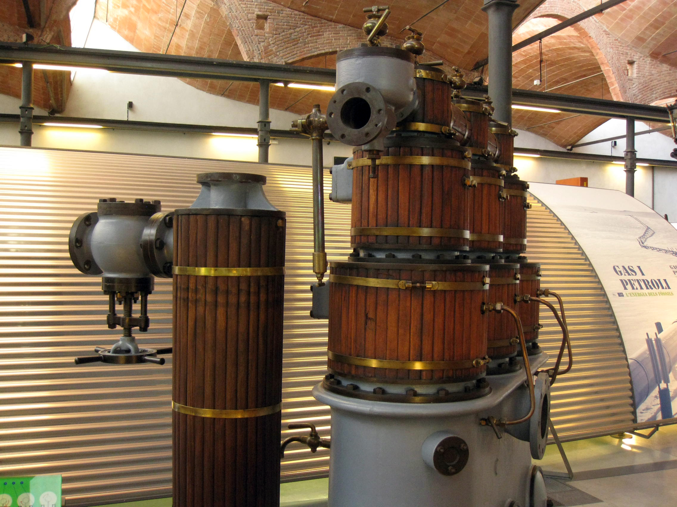 Fàbrica Aymerich, Amat i Jover (Terrassa) Object location41° 33′ 54.49″ N, 2° 00′ 28.14″ E